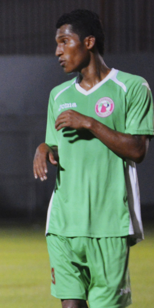 Carlos Bailón jugando en el Deportivo Azogues en 2015